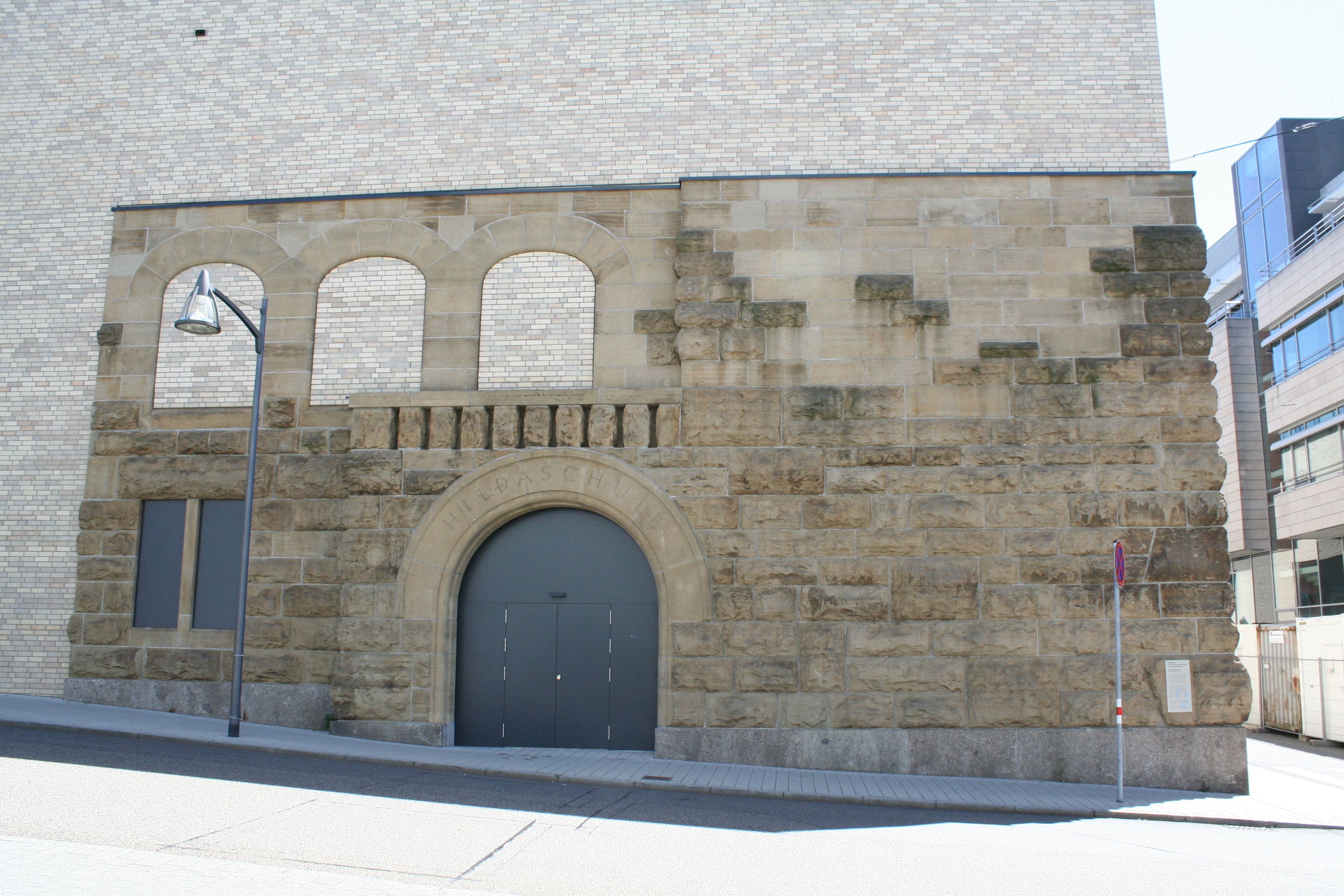 Pforzheim